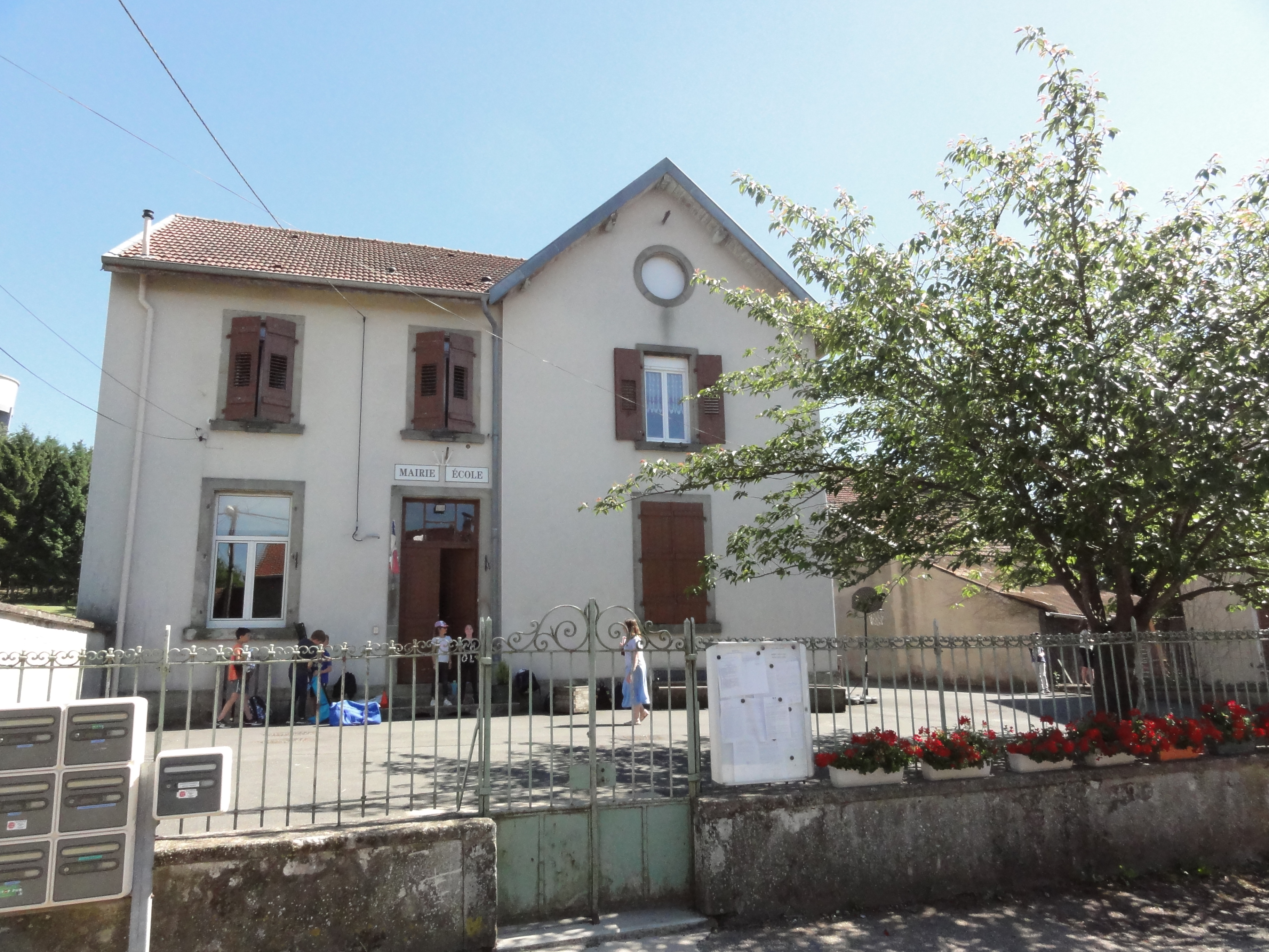 Guébling (Moselle) mairie - école